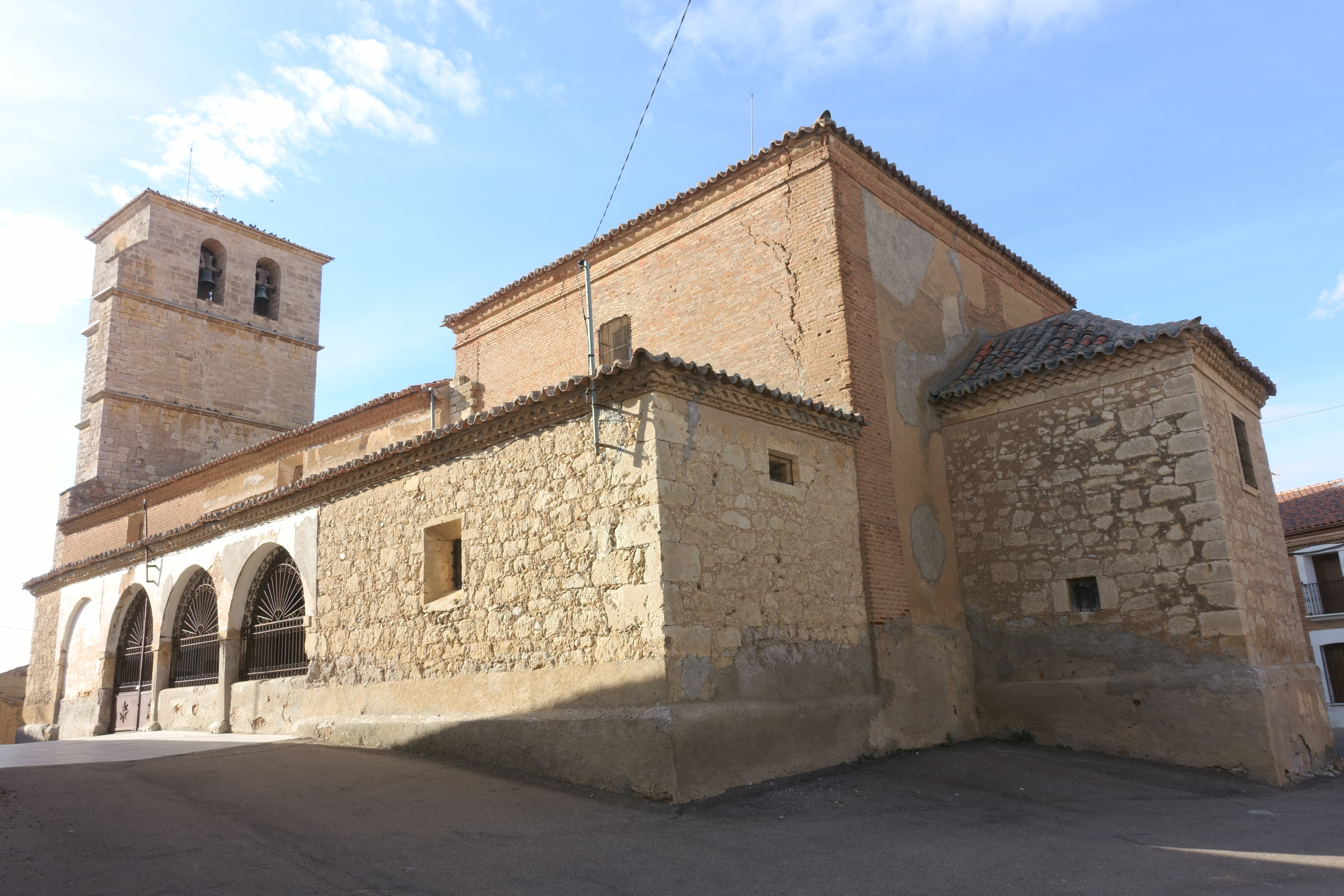 Iglesia de San Miguel, Malva (Zamora, España).